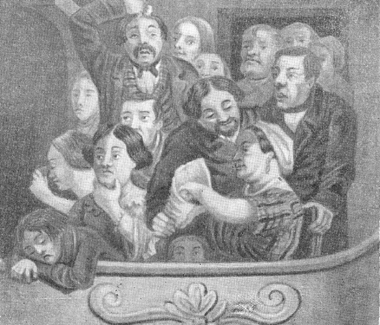 The audience in the theater box. Watercolor by an unknown artist, 1840-1850-ies